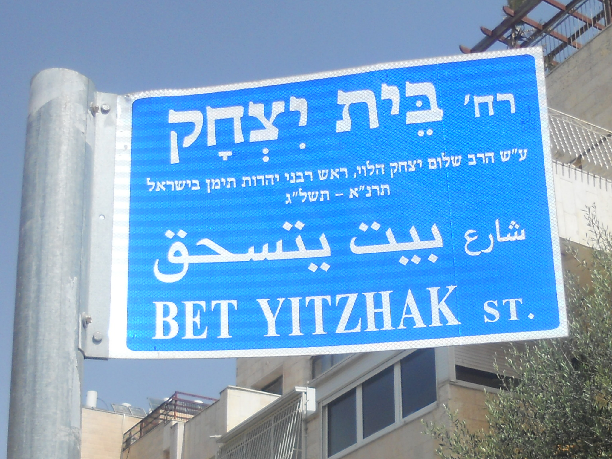 רחוב בית יצחק, על שם רבי שלום יצחק הלוי